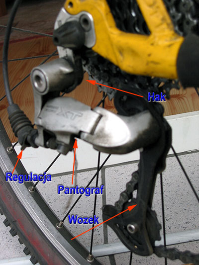 Przerzutka rowerowa tylna - Shimano XT - zdjęcie własne